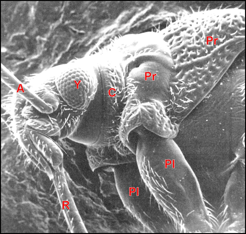 Vue de profil d' Arachnocoris karukerae au microscope électronique à balayage.